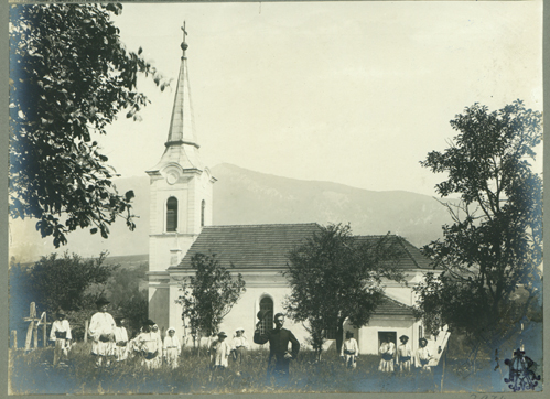 Adler - Biserica Greco-Catolică din Părojeni, jud. Hunedoara